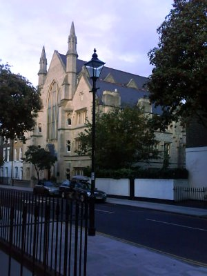 Parafia MB. Częstochowskiej przy Devonia Road w dzielnicy Islington w Londynie.Unknown